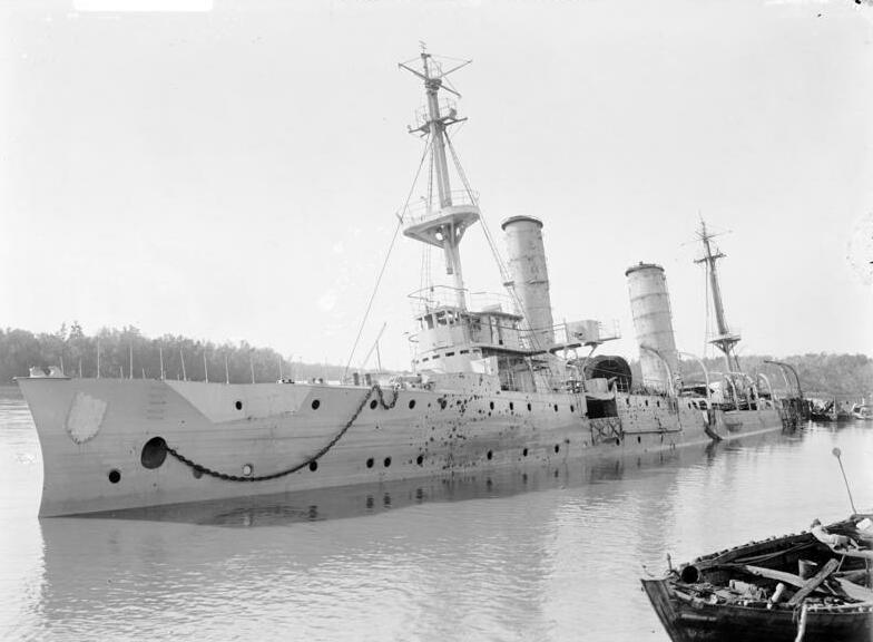 Kreuzer Königsberg zerschossen Information added by Wikimedia users.